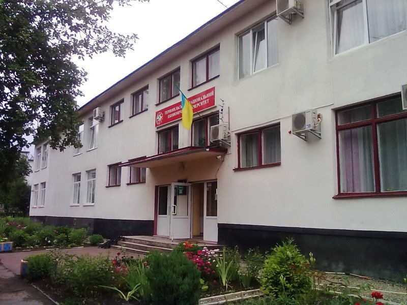 Калуський коледж ТНЕУ